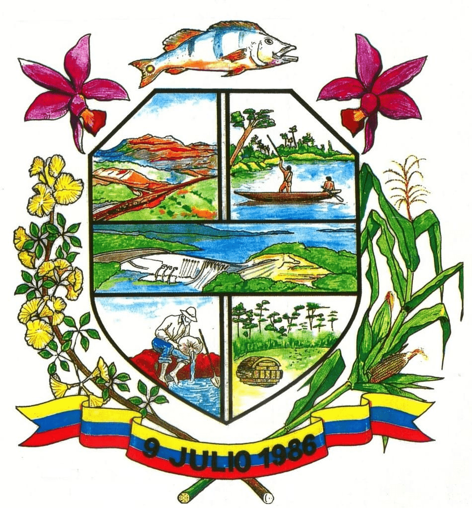 Escudo del municipio Bolivariano Angostura. Estado Bolívar. Venezuela